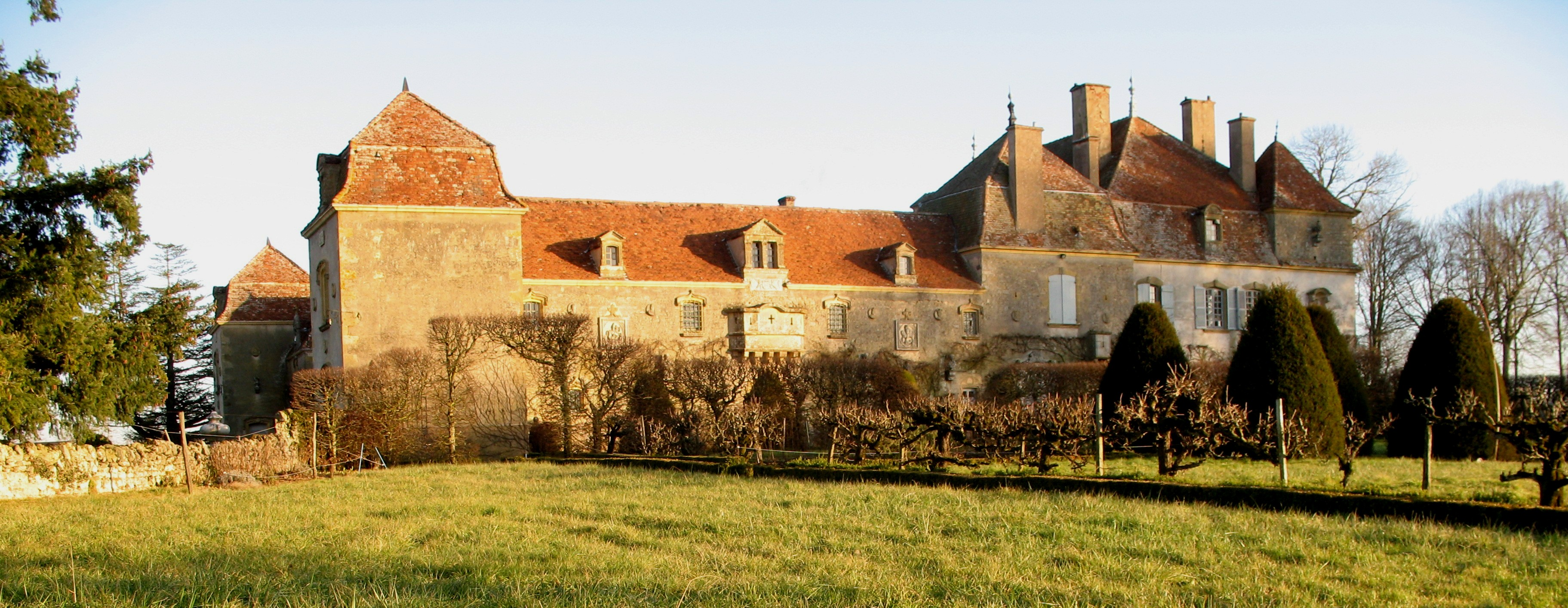 château de Chaumont - Oyé (Saône-et-Loire)